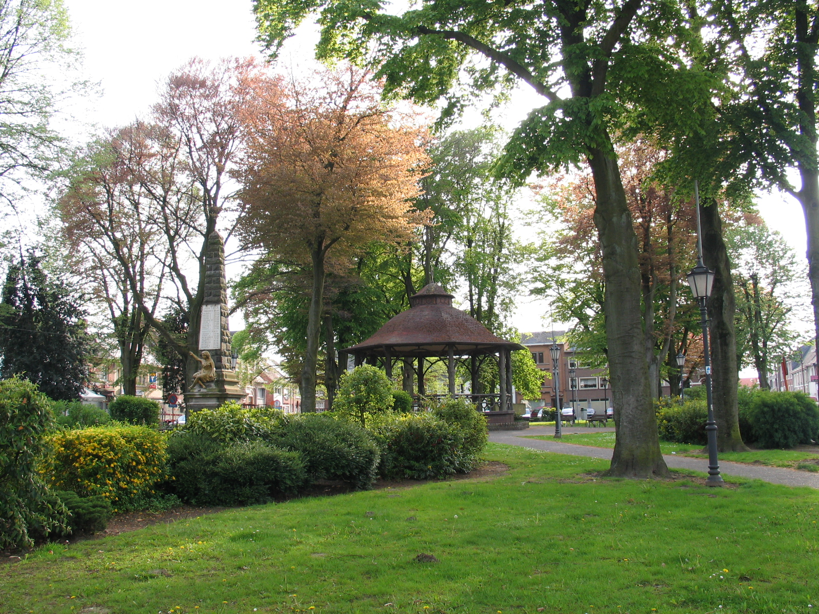 Marktplein Zichem - eigen foto